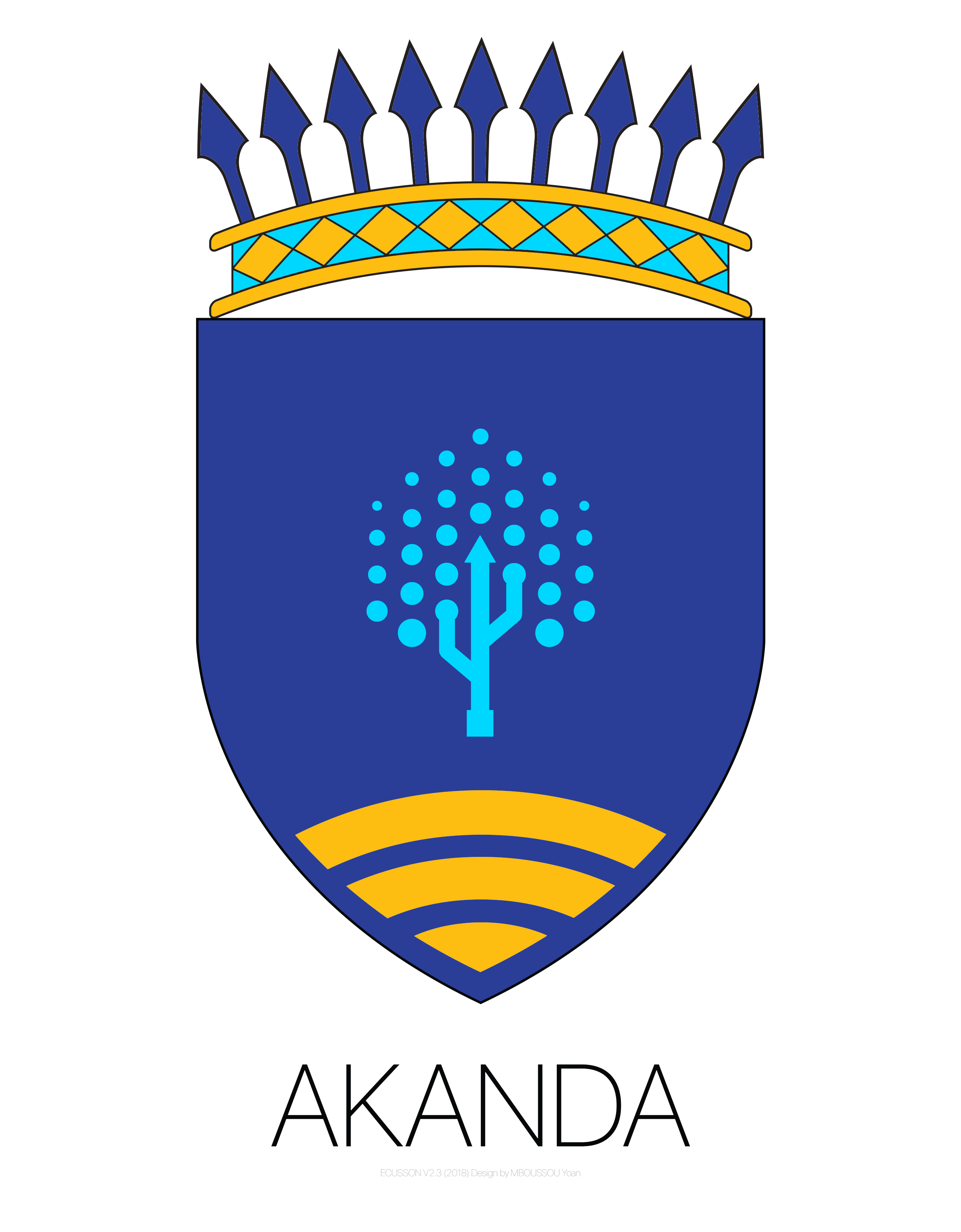 Blason de la ville d'Akanda